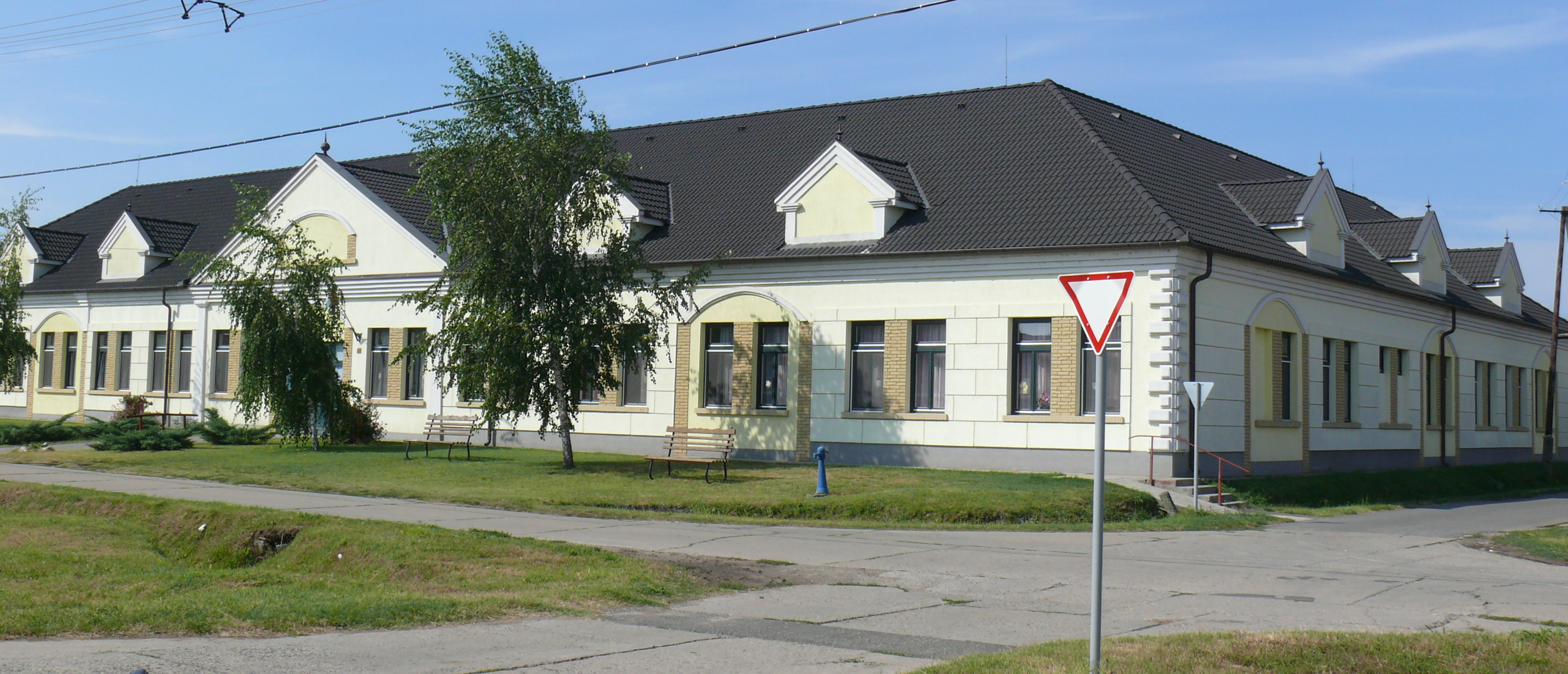 Az új Idősek Otthona Vaskúton